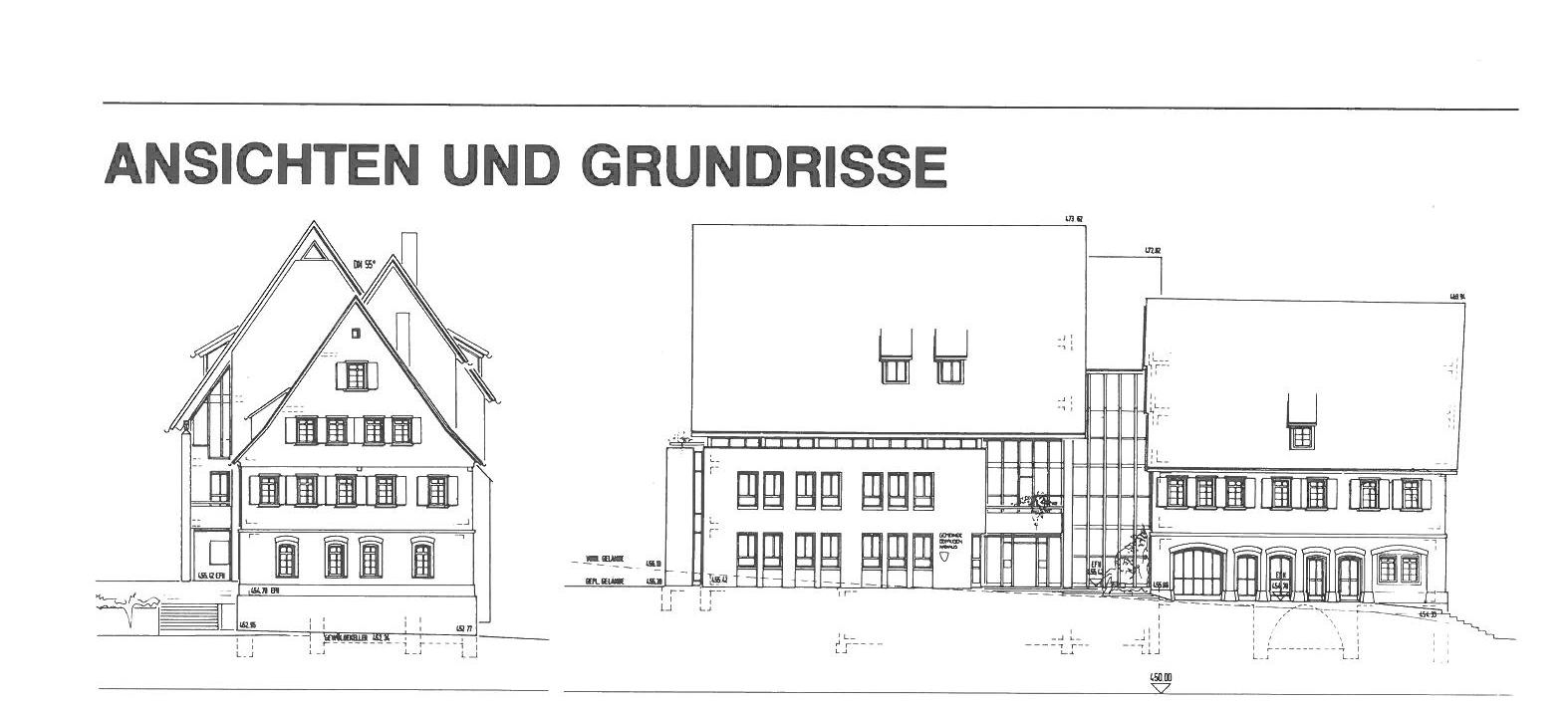 Bauansicht des Rathaus Ebhausen. Mit freundlichen Genehmigung der Gemeinde Ebhausen